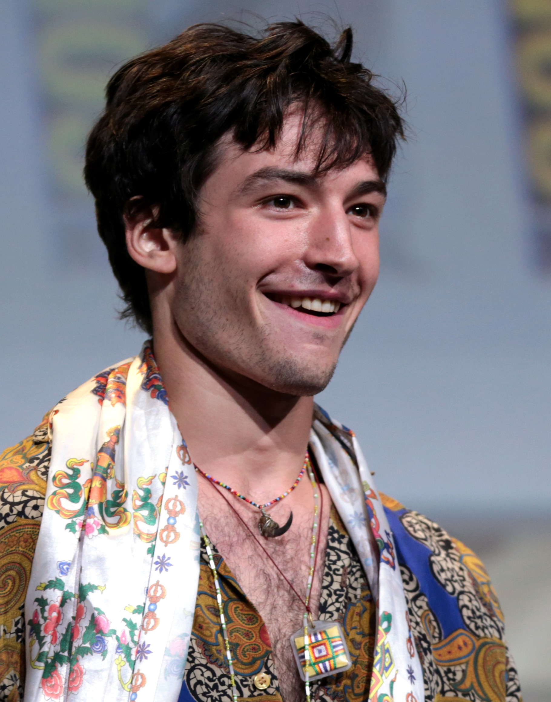 Ezra Miller en 2016, lors de la promotion du film "Les Animaux fantastiques" au San Diego Comic Con International, Californie.